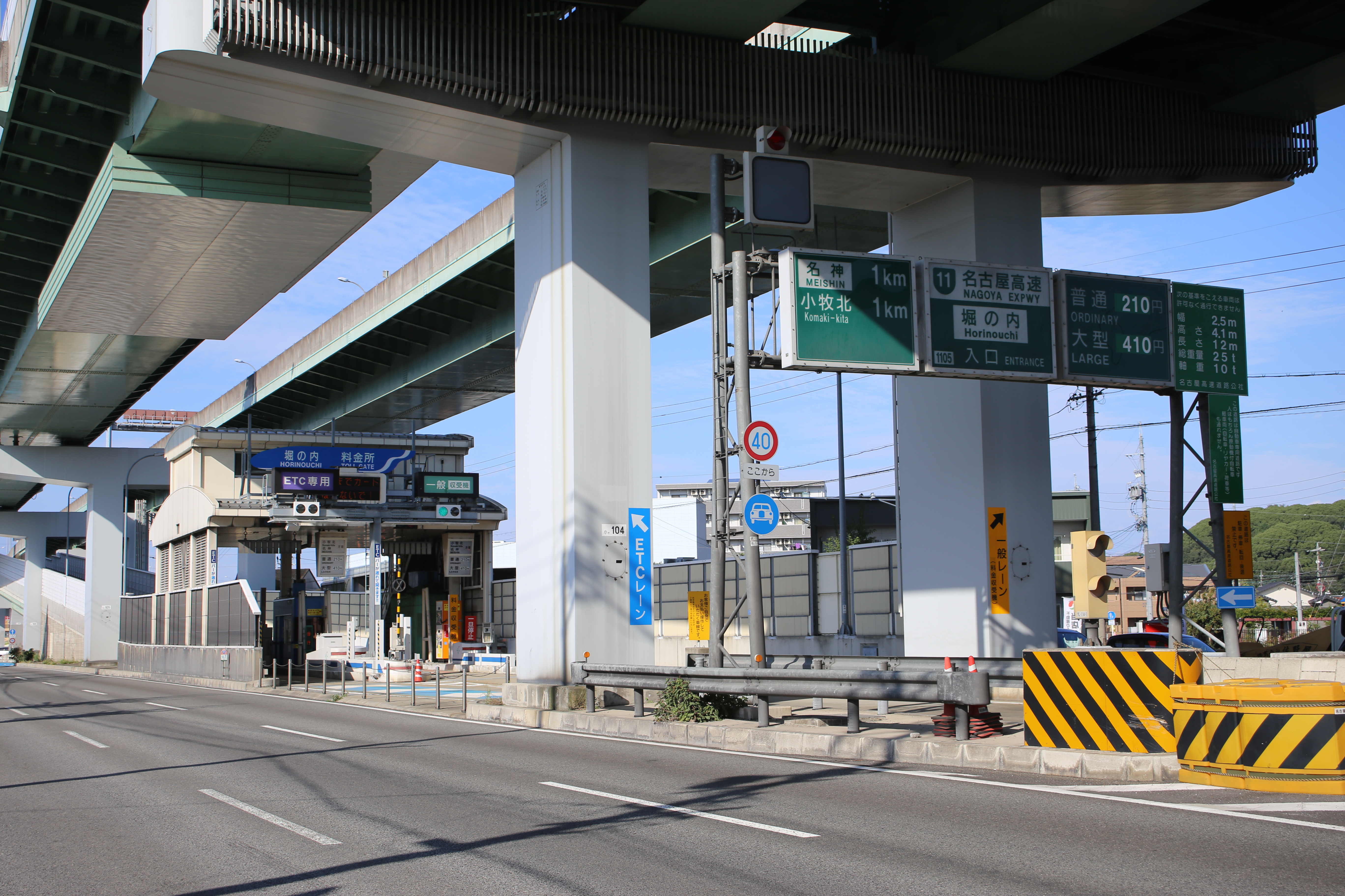 愛知県小牧市の名古屋高速11号小牧線堀の内入口